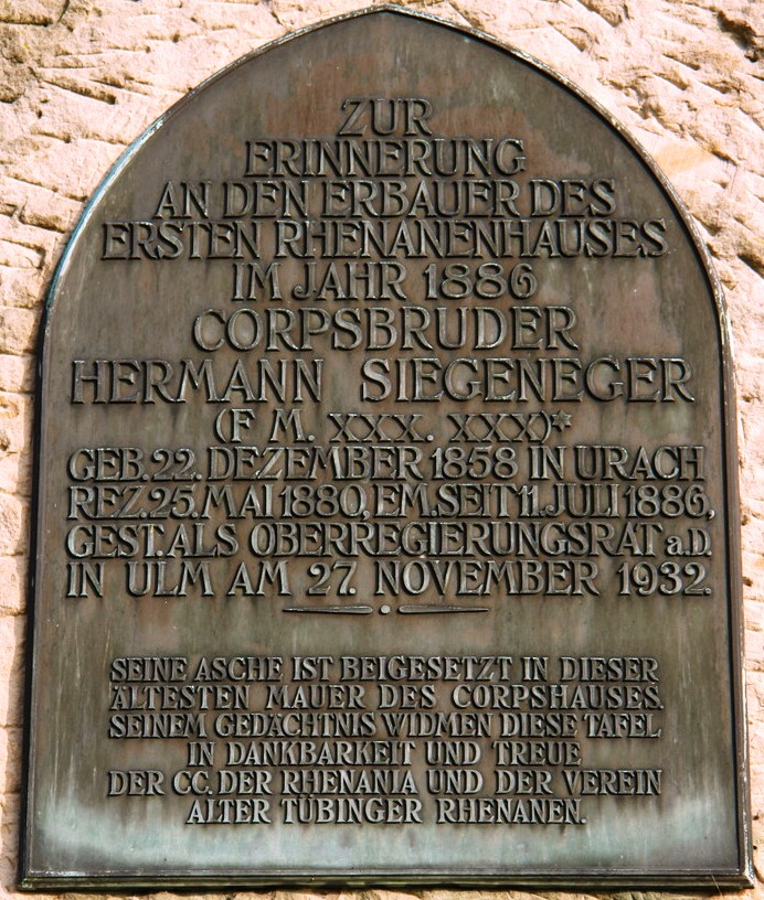 Gedenktafel für Karl Hermann Siegeneger am Corpshaus des Corps Rhenania Tübingen auf dem Österberg in Tübingen.